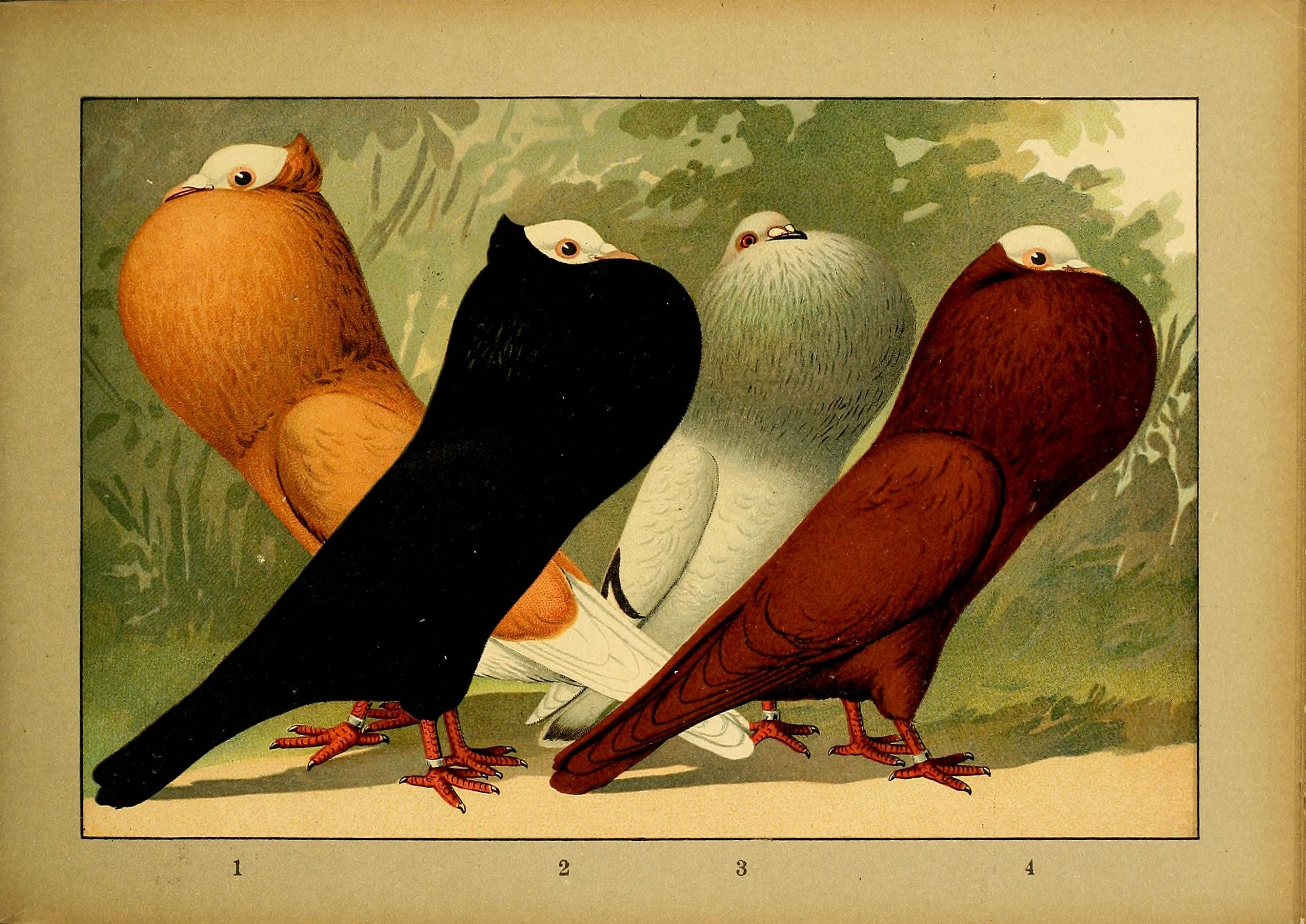 Deutsch